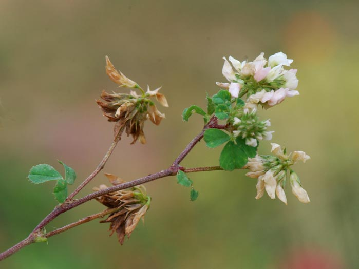 Trèfle noircissant